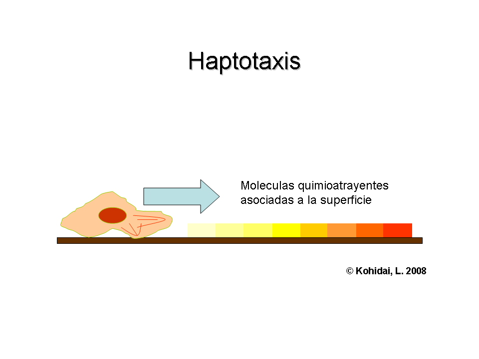 Haptotaxis